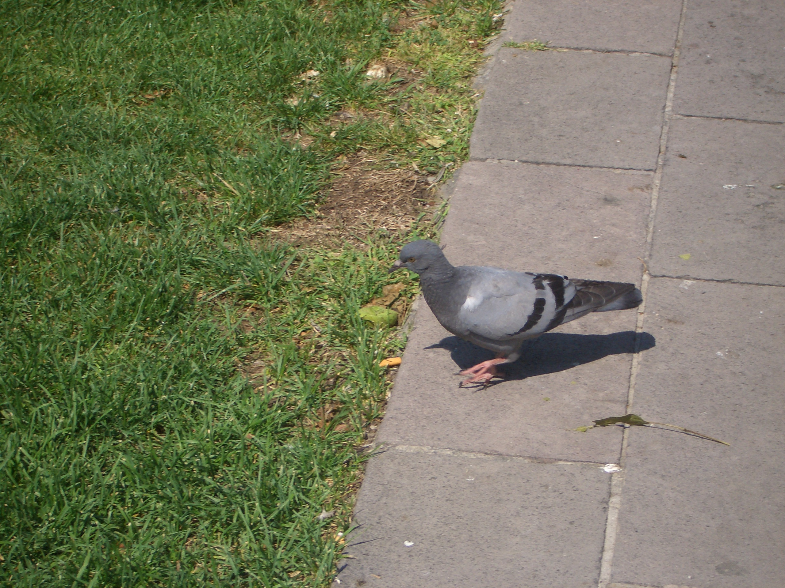 Ankara'da bir güvercin.